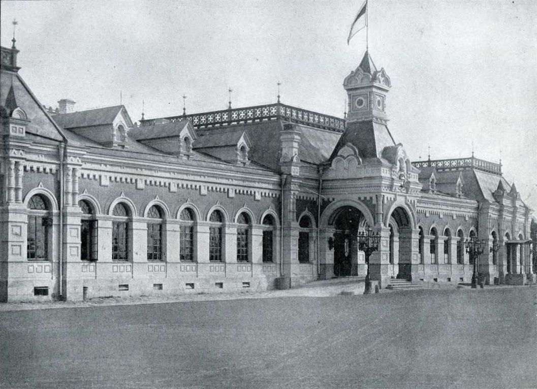 Вокзал Пермской железной дороги в Екатеринбурге